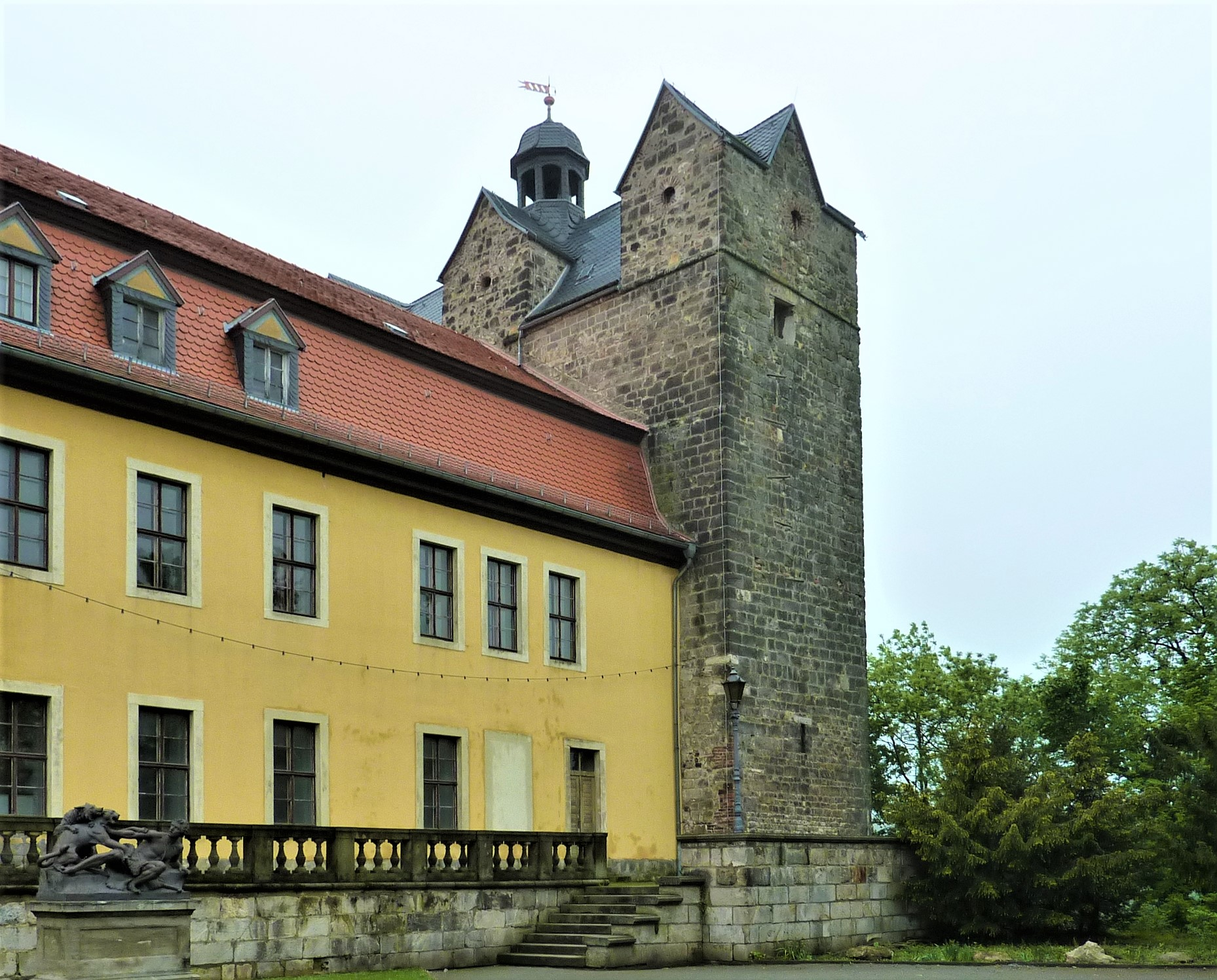 St. Pancratius und Abundus (Ballenstedt), Historisches Westwerk und Kirchenflügel